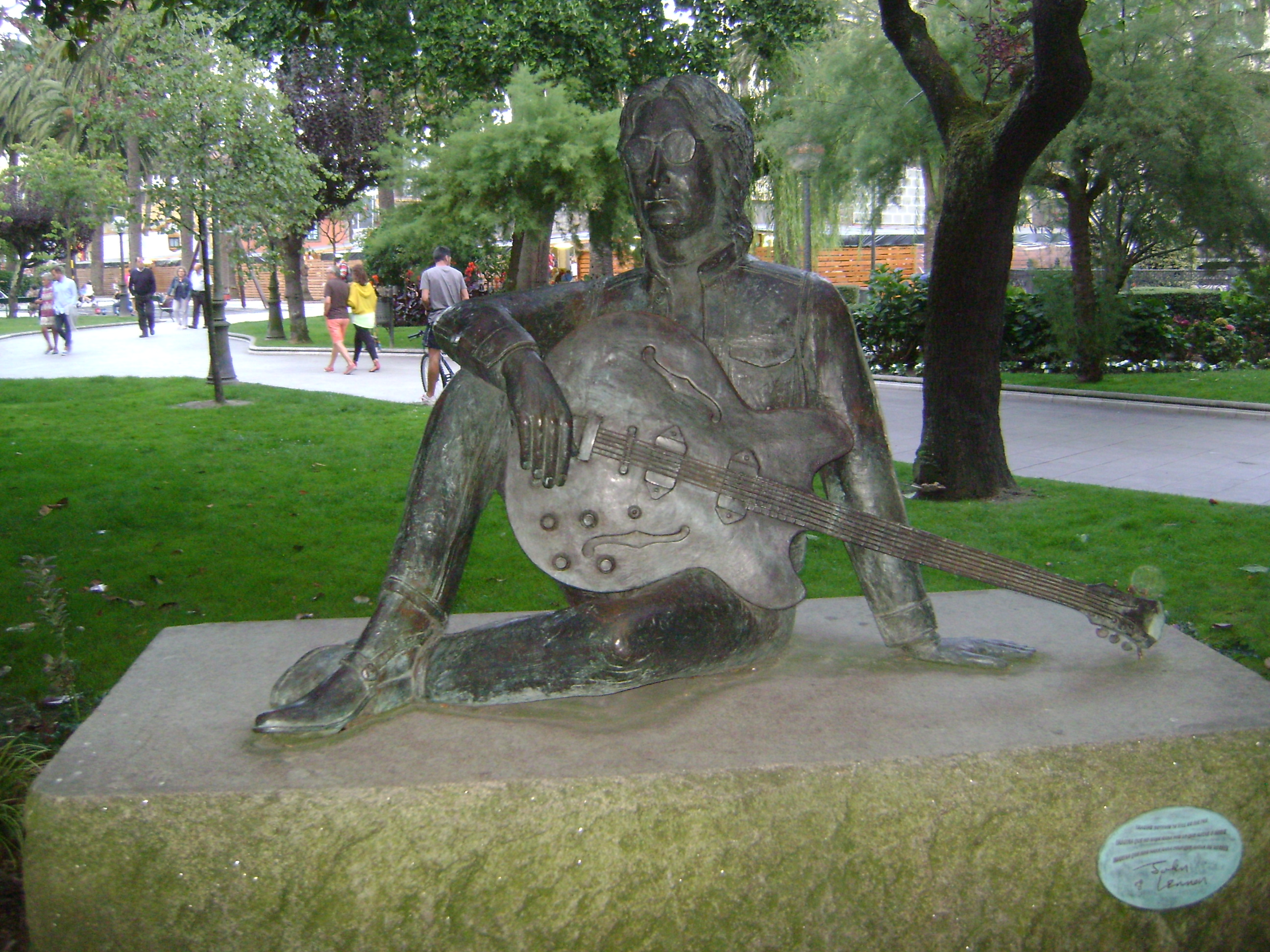 Estatua de John Lennon, Jardines de Méndez Núñez, La Coruña, España.